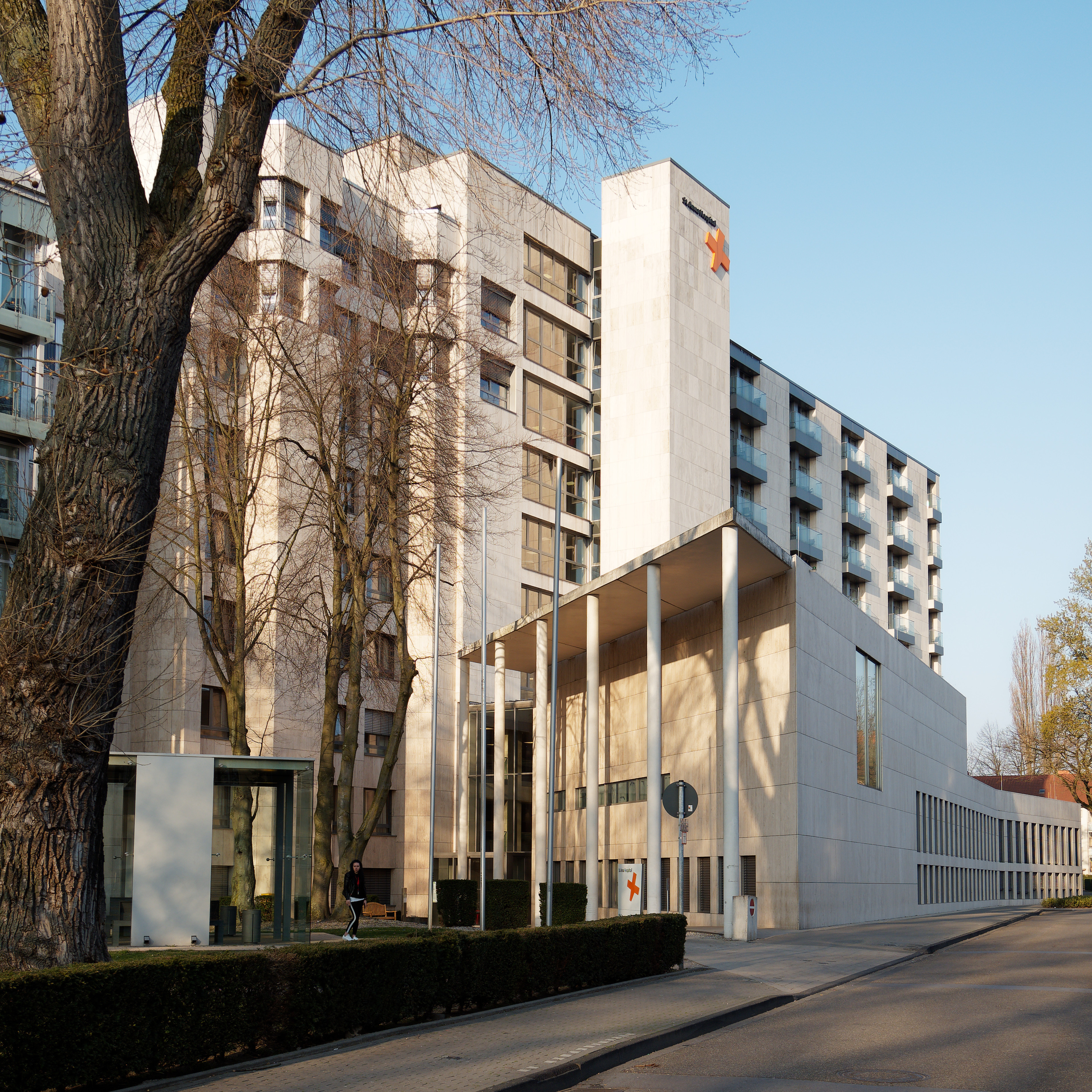 Herne, Eingangsbereich des Sankt Anna Hospitals in Herne-Wanne.